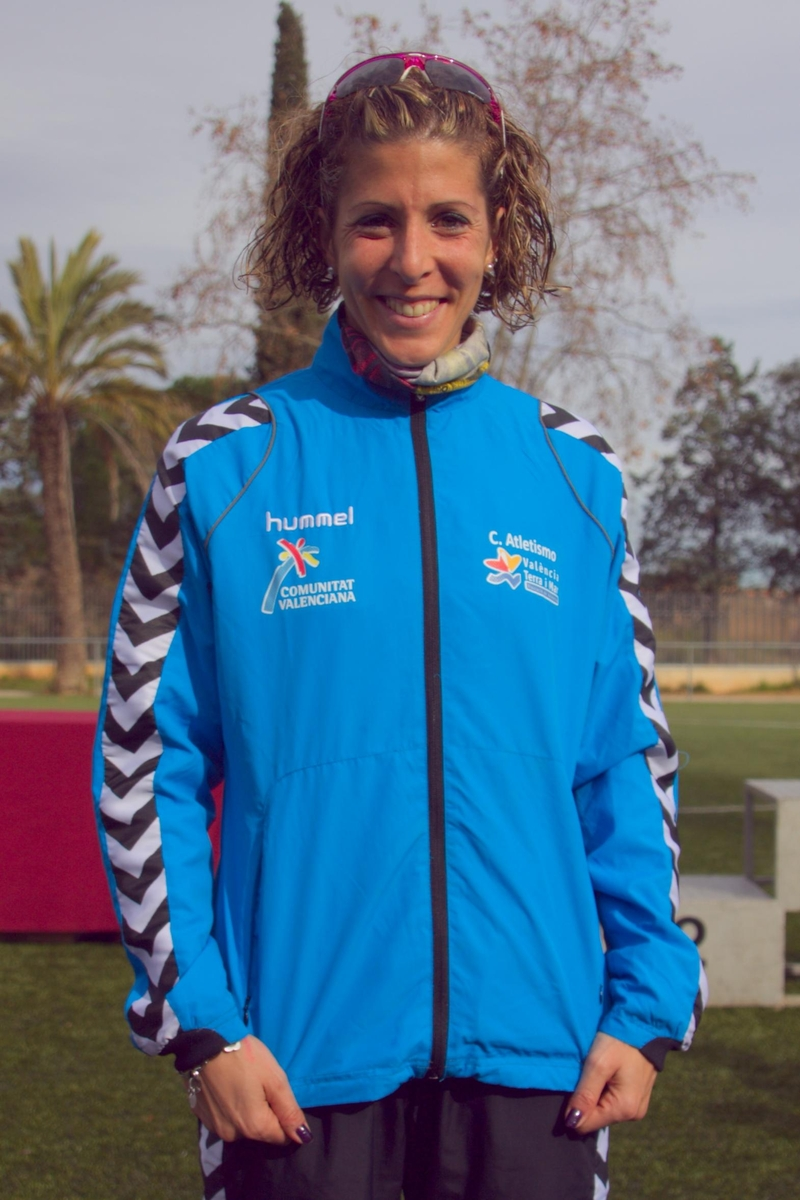 Beatriz Pascual, marchadora española. Ha participado en los Juegos Olímpicos de 2008 y 2012. Fotografía realizada en durante la celebración del Gran Premio de Marcha Ciudad de Viladecans, el 26 de enero de 2014.